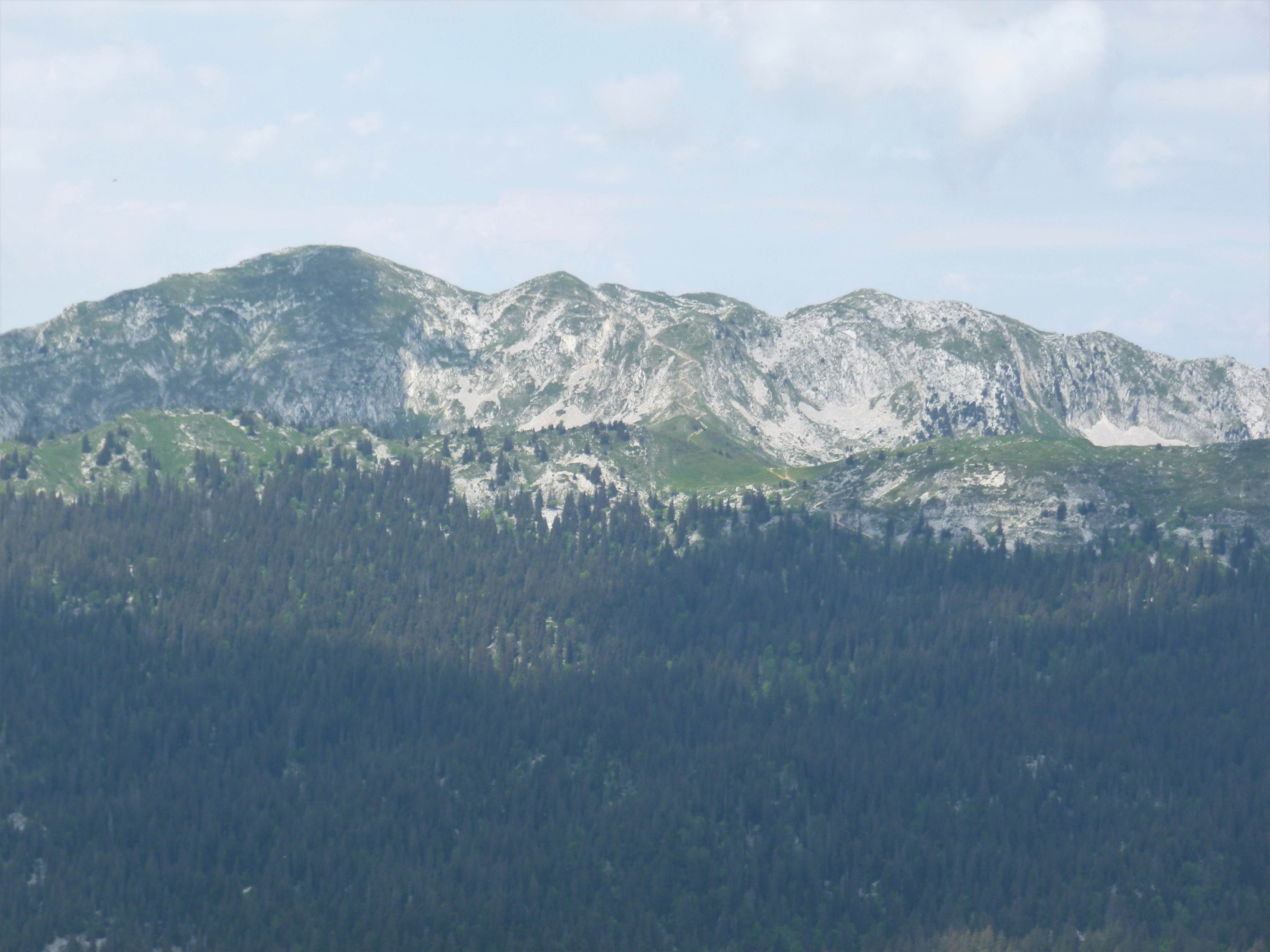 La forêt de Génieux dominée par la Grande Sure.